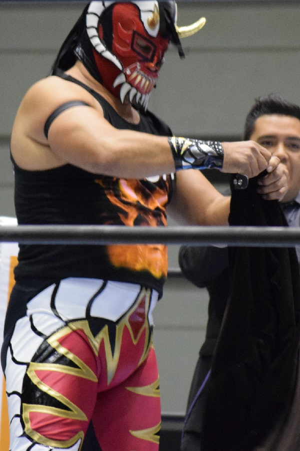 2017年1月13日 大阪府立体育会館・第二競技場「CMLL FANTASTICA MANIA 2017」 エフェスト